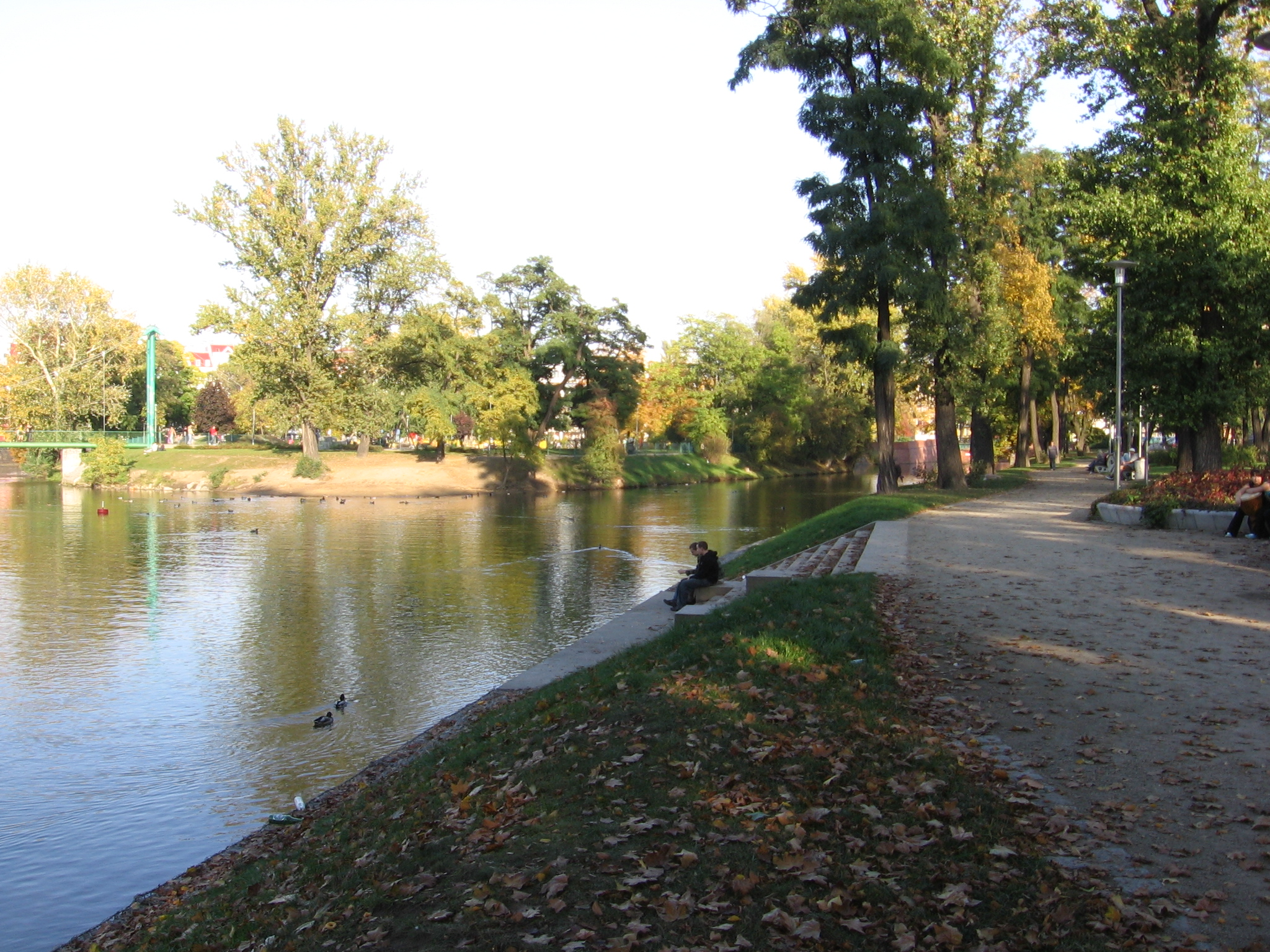 Widok z Wyspy Słodowej na Wyspę Bielarską we Wrocławiu Po lewej Żabia Kładka (w kolorze zielonym), w prawej połowie kadru widoczne w oddali czerwone ceglane pozostałości rynien roboczych Młynów Świętej Klary.